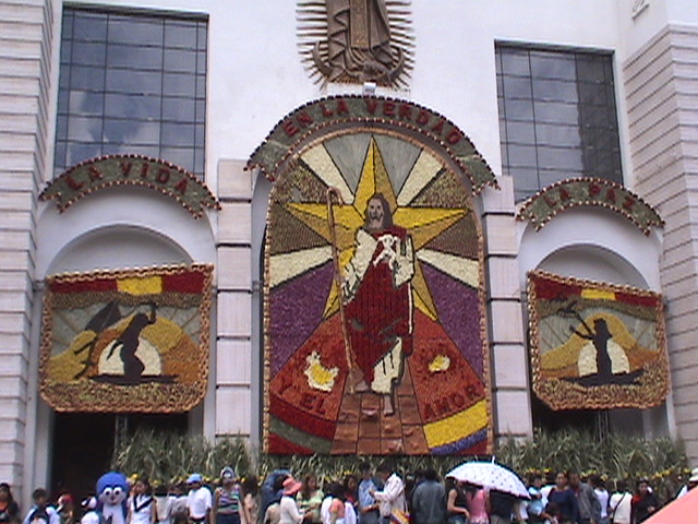 Iglesia de Ambato